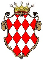 Stemma della casata degli Appiani di Piombino.